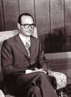 Jacques Chirac (at the time, Prime Minister of France) during a visit in Neptun, Romania, in 1975